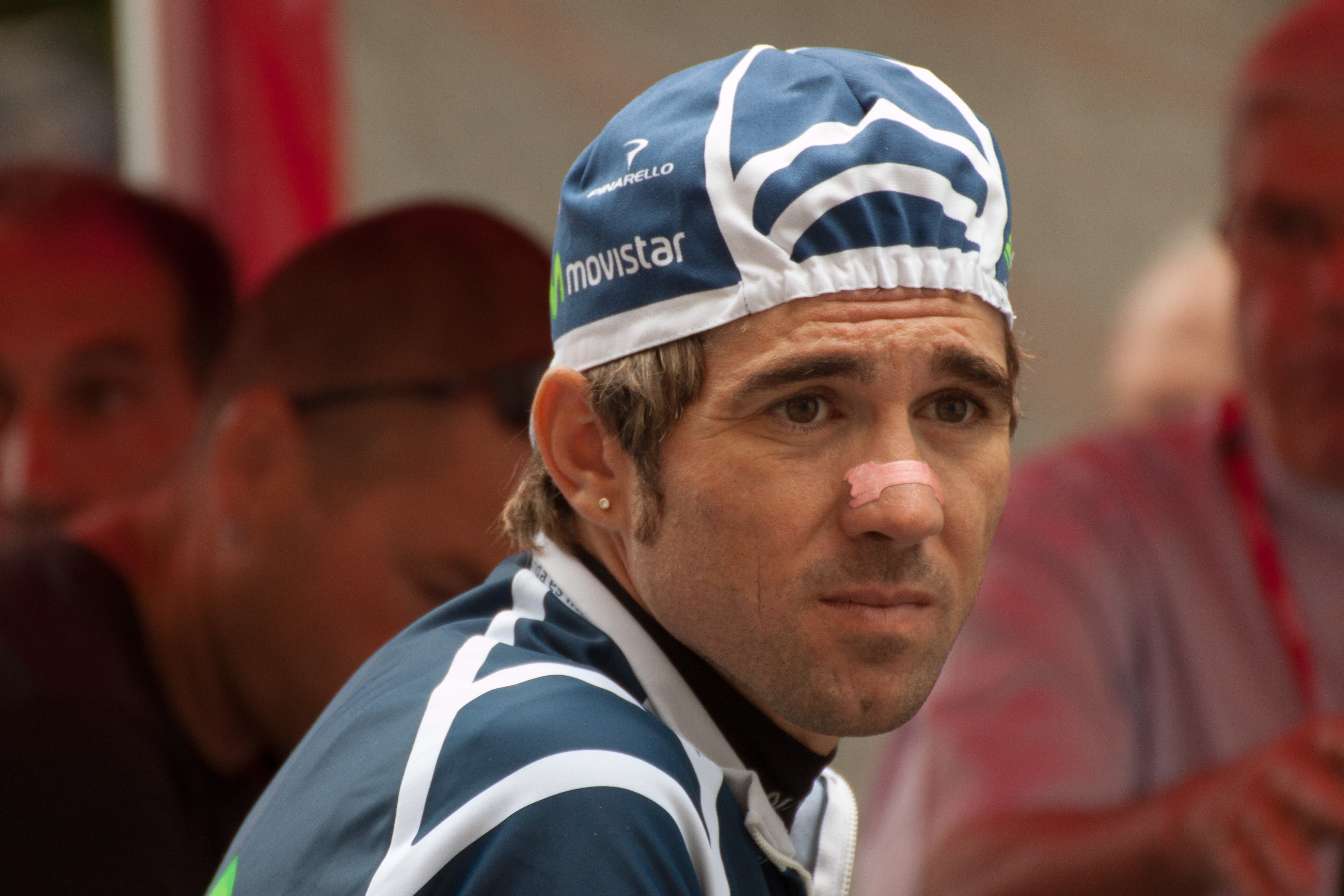 David Arroyo au Prologue du Critérium du Dauphiné 2012